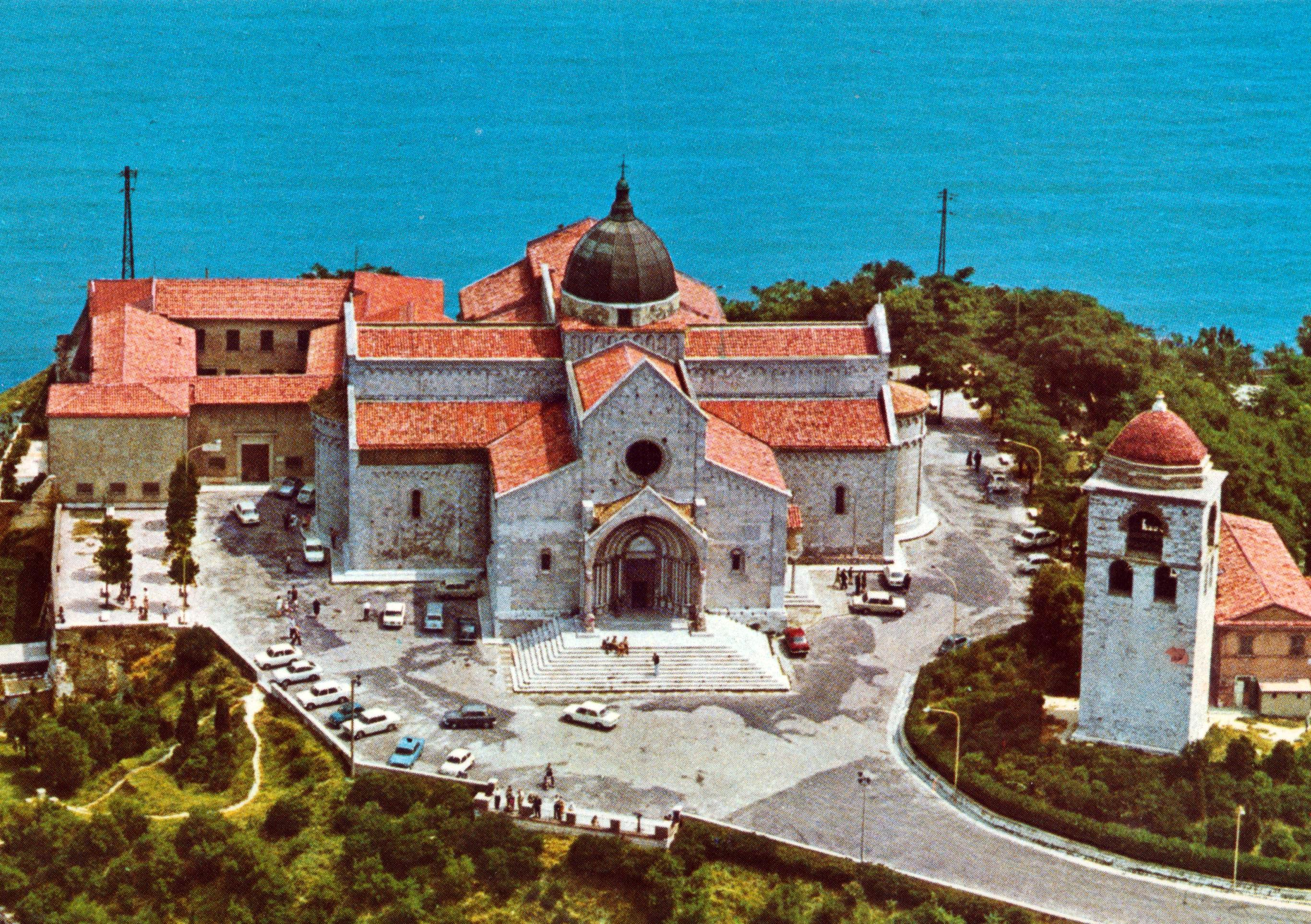 Veduta aerea del Duomo di Ancona (San Ciriaco) negli anni Sessanta del Novecento